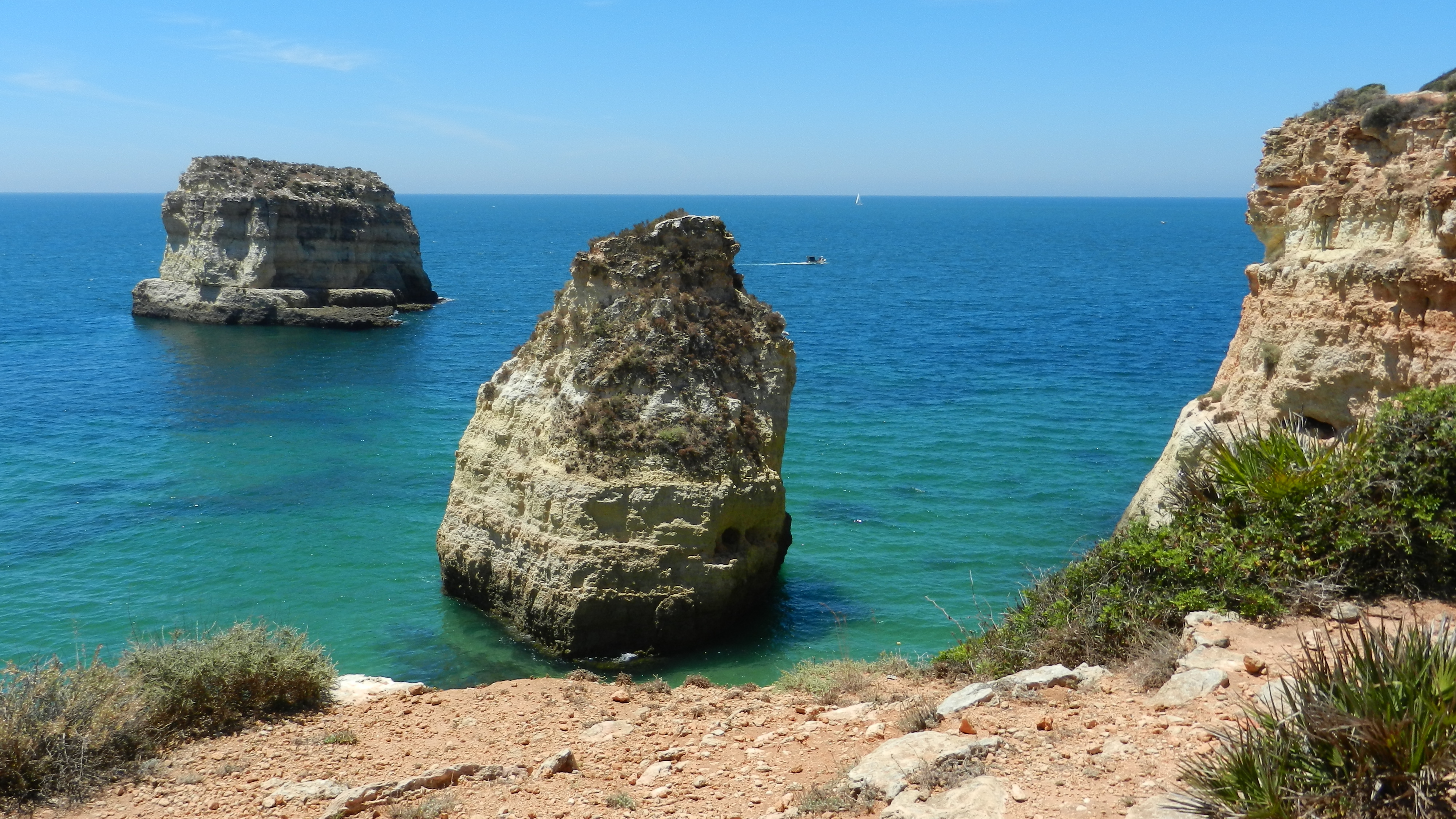 Algarve, Portugal